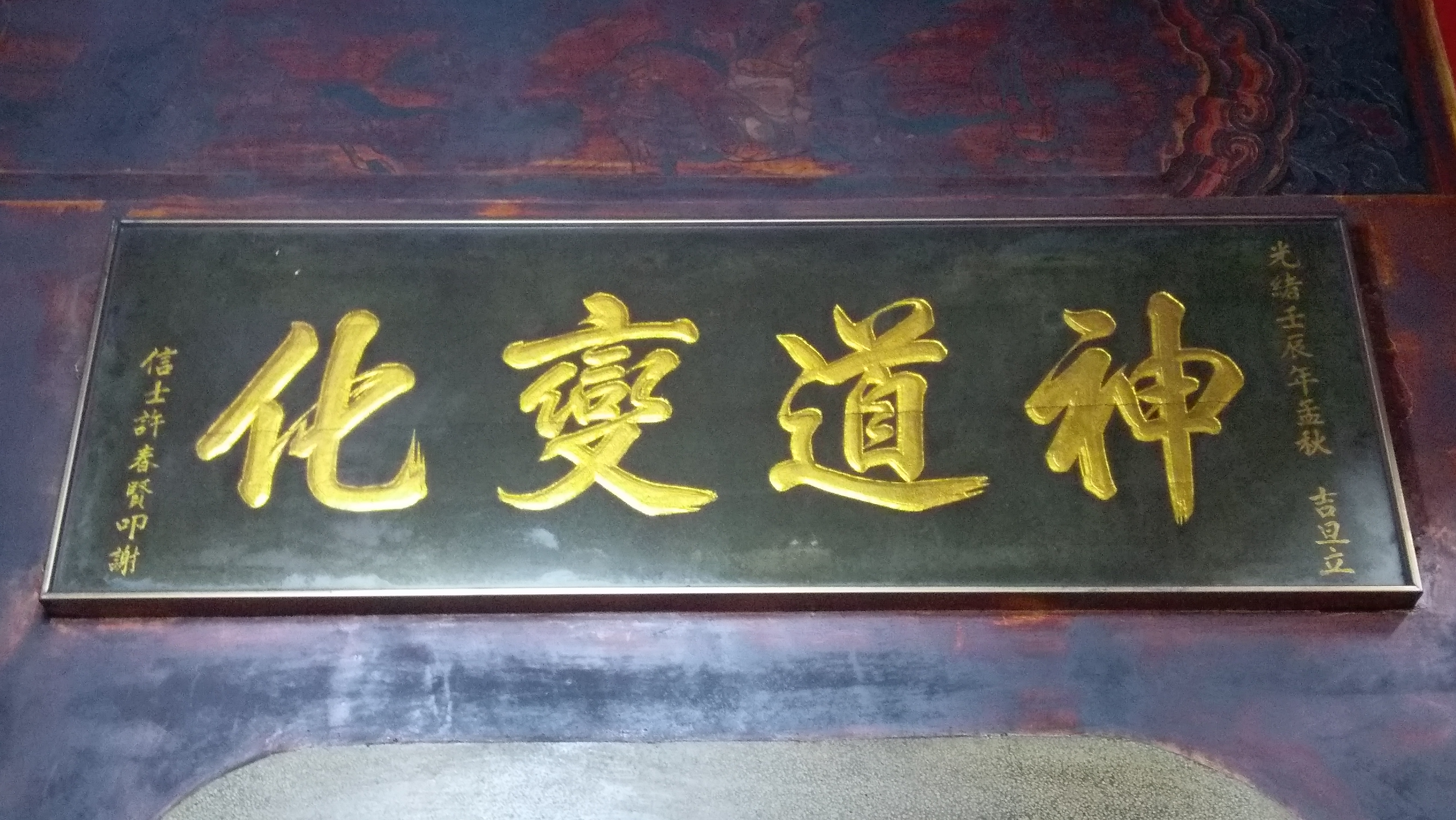 中文（台灣）: 大清光緒18年（公元1892年）匾額「神道變化」